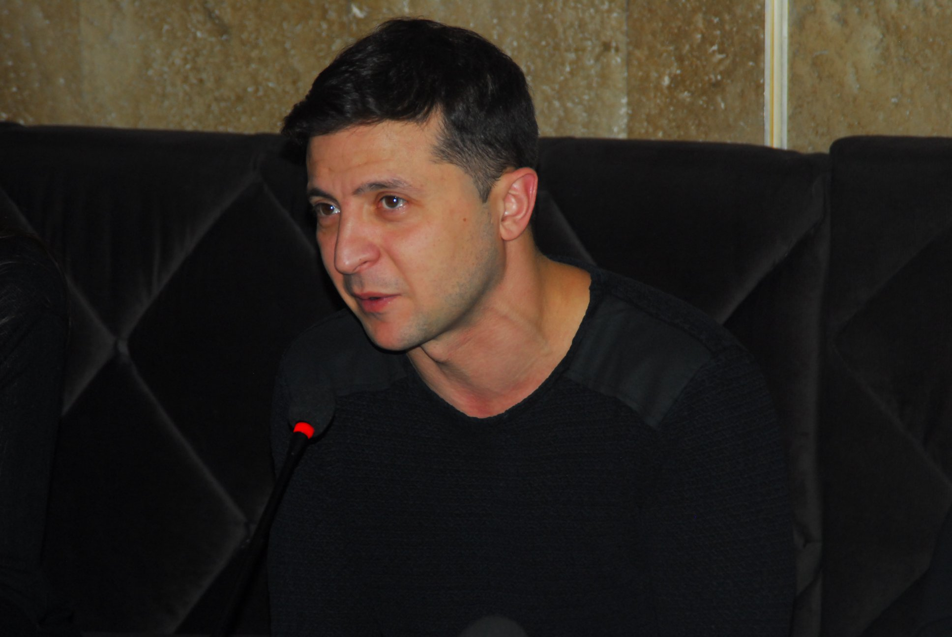 Владимир Зеленский